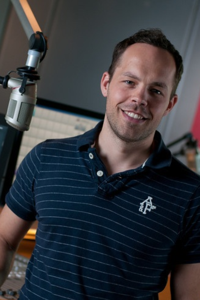 Andre Wieckenberg, Radiomoderator beim Mitteldeutschen Rundfunk